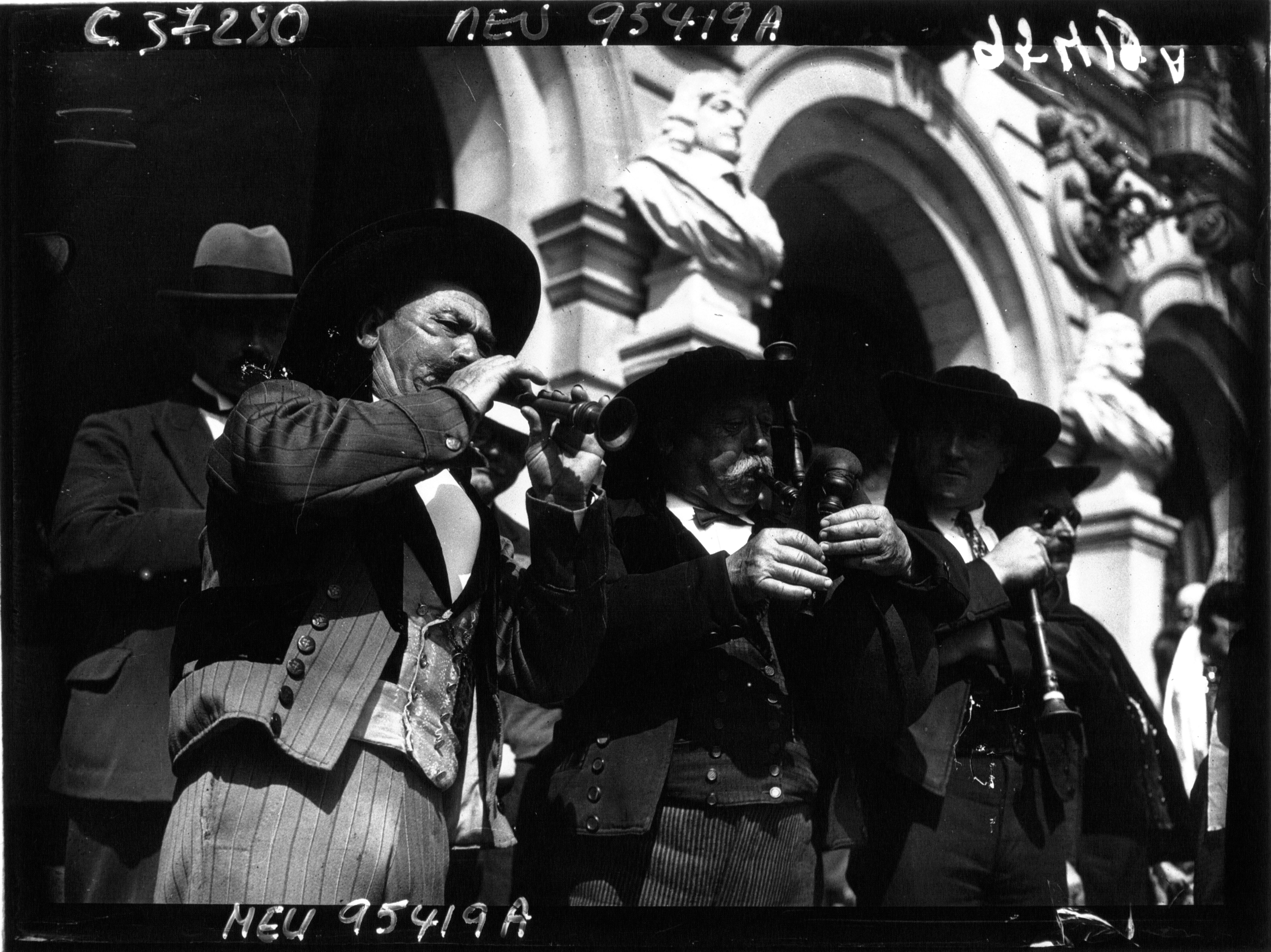 Visite du président de la République Edouard Herriot en août 1932 pour célébrer le 400ème anniversaire de l'union de la Bretagne à la France.